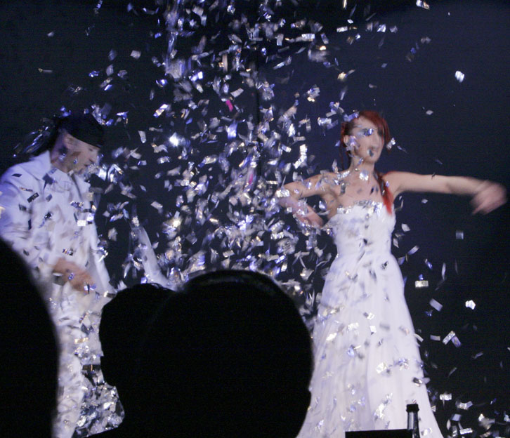 Die Verwandlungskünstler Sos und Victoria Petroysn